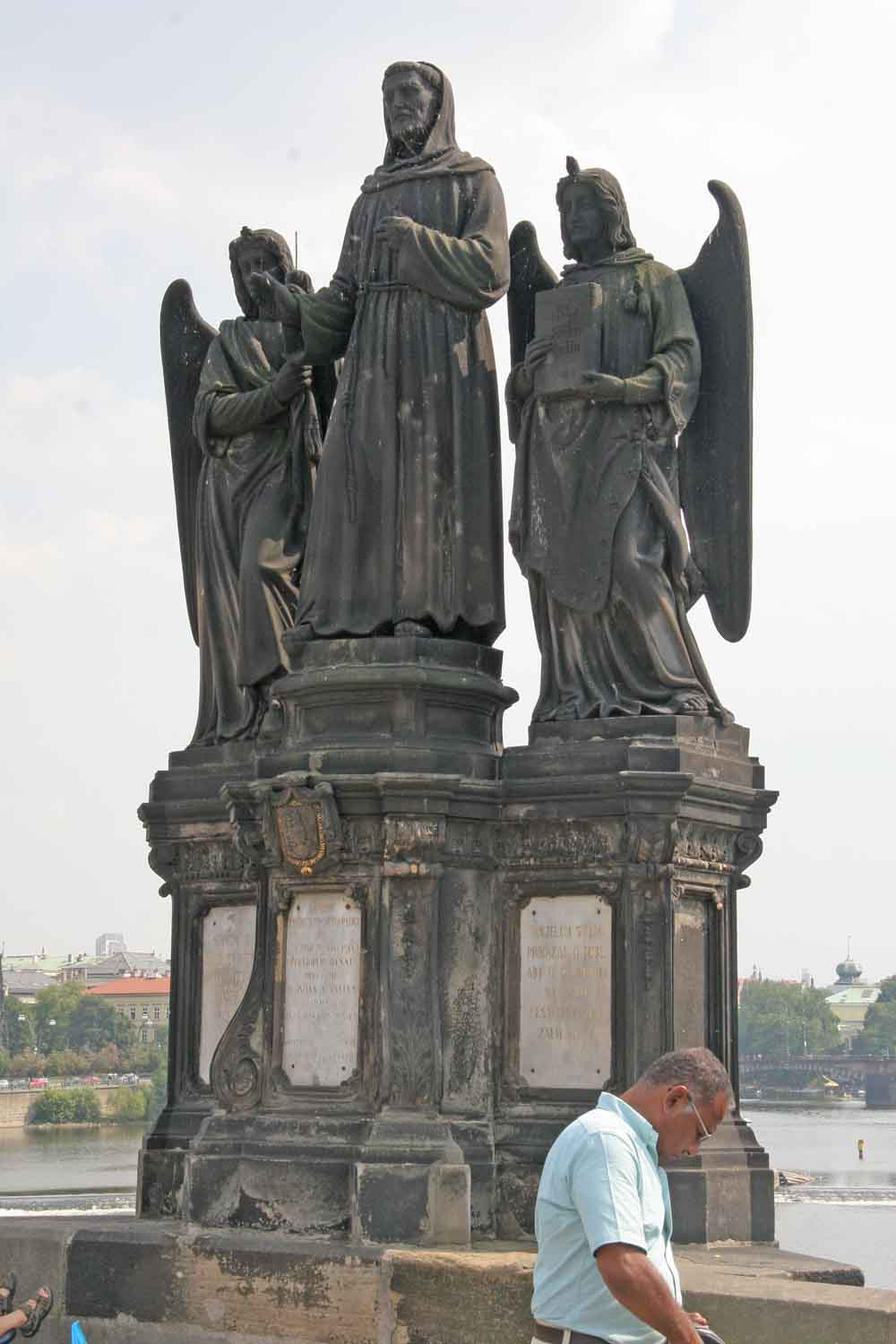 Česky: Sousoší Svatého Františka Serafinského na Karlově mostě